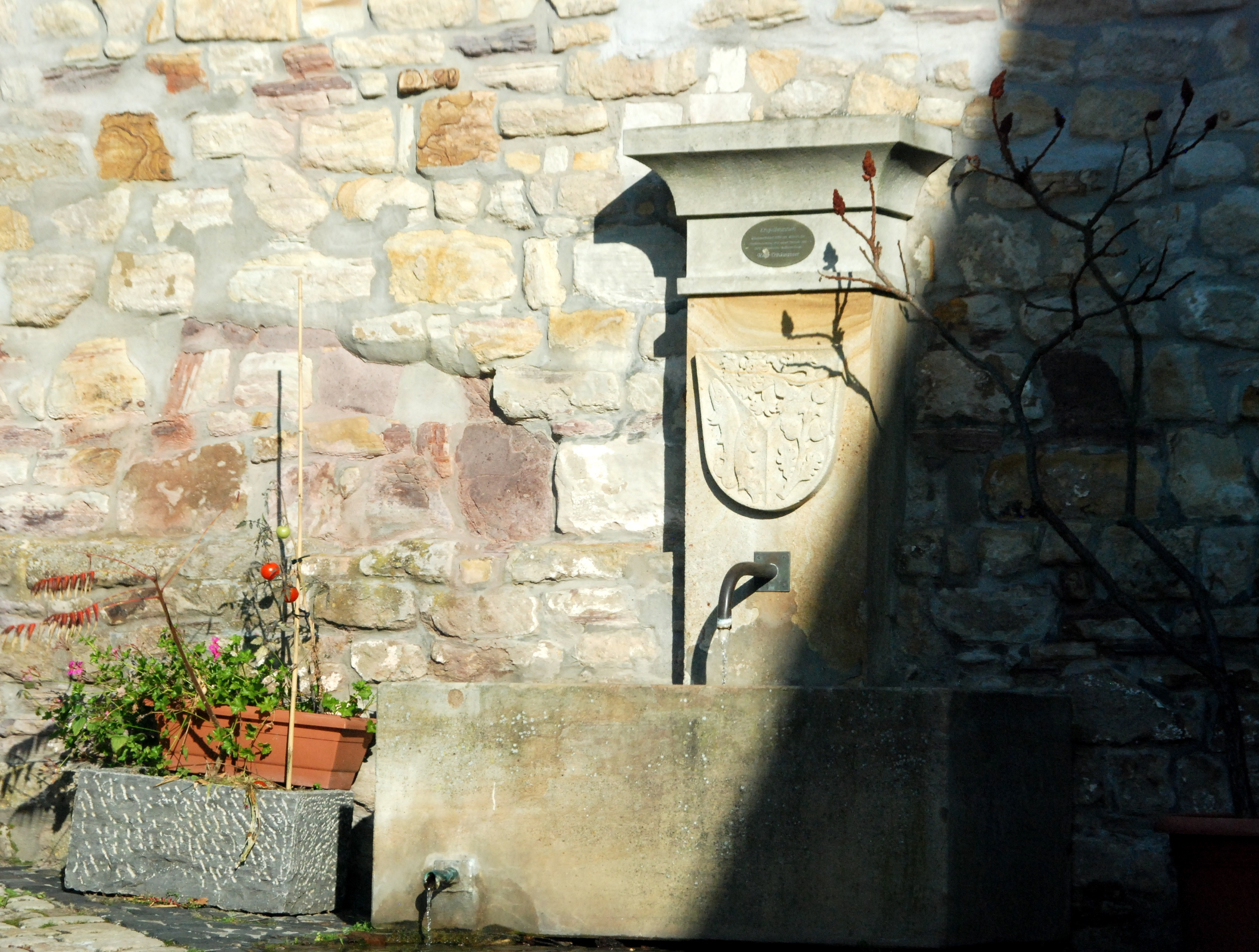 Rommersheim, Gemeinde Wörrstadt; Brunnen in Rommersheim mit dem historischen Ortswappen von Eichloch, dem späteren Rommersheim. Überliefert wurde das Eichlocher Wappen durch ein Gerichtssiegel von 1742. Es zeigt einen dreiteiligen Schild. Oben in Gold ein roter Löwe - Hinweis auf die Wildgrafen von Dhaun, vorne links in rot zwei silberne Salme - Hinweis auf die Fürsten von Salm-Salm (wie sich die Wild- und Rheingrafen später nannten), vorn rechts in silber ein grüner Eichenzweig als Ortszeichen. Dieses Wappen findet sich hier als steinerne Brunnendekoration wieder.